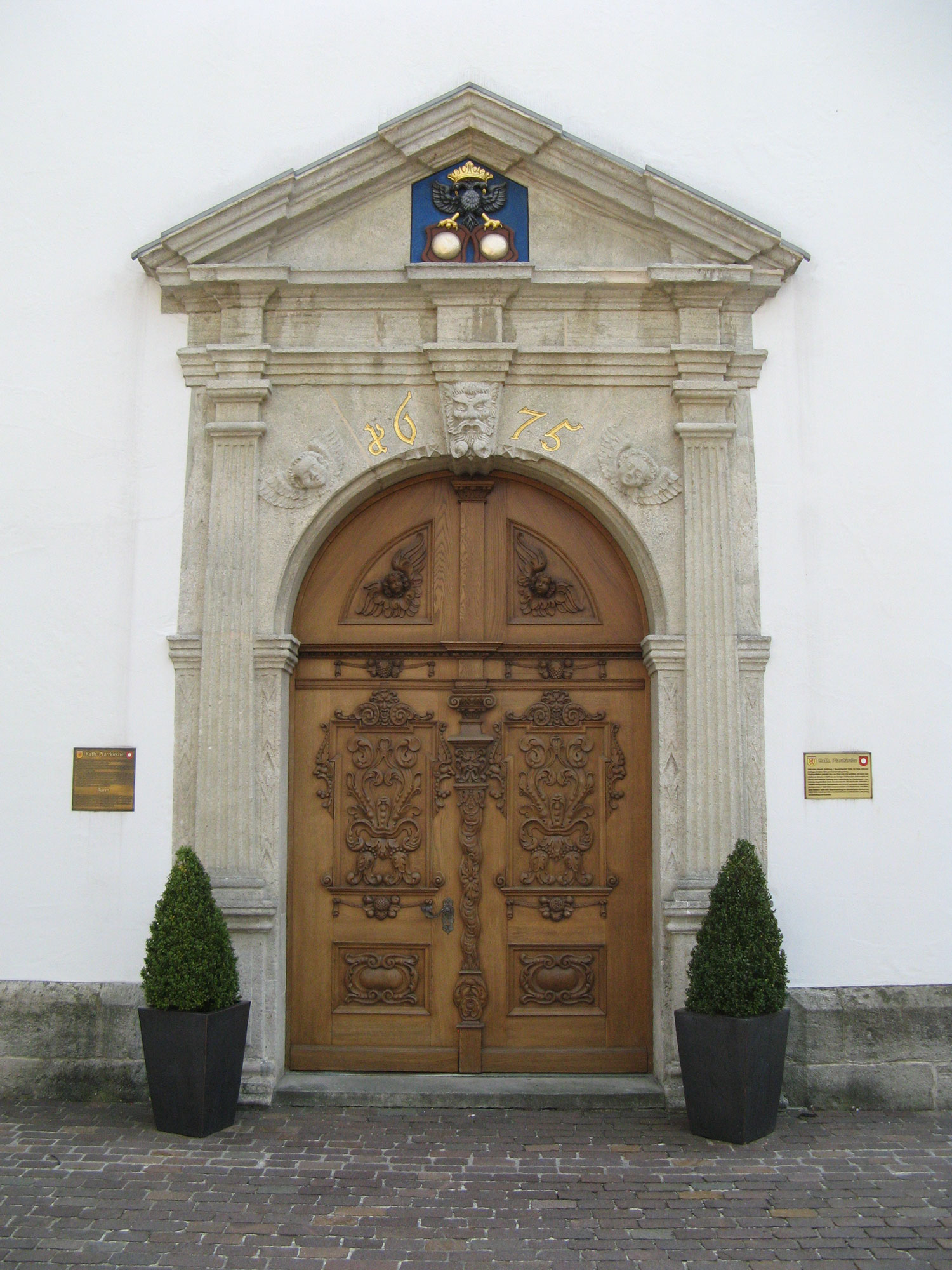 Stadtkirche Mellingen, Portal des Haupteingangs